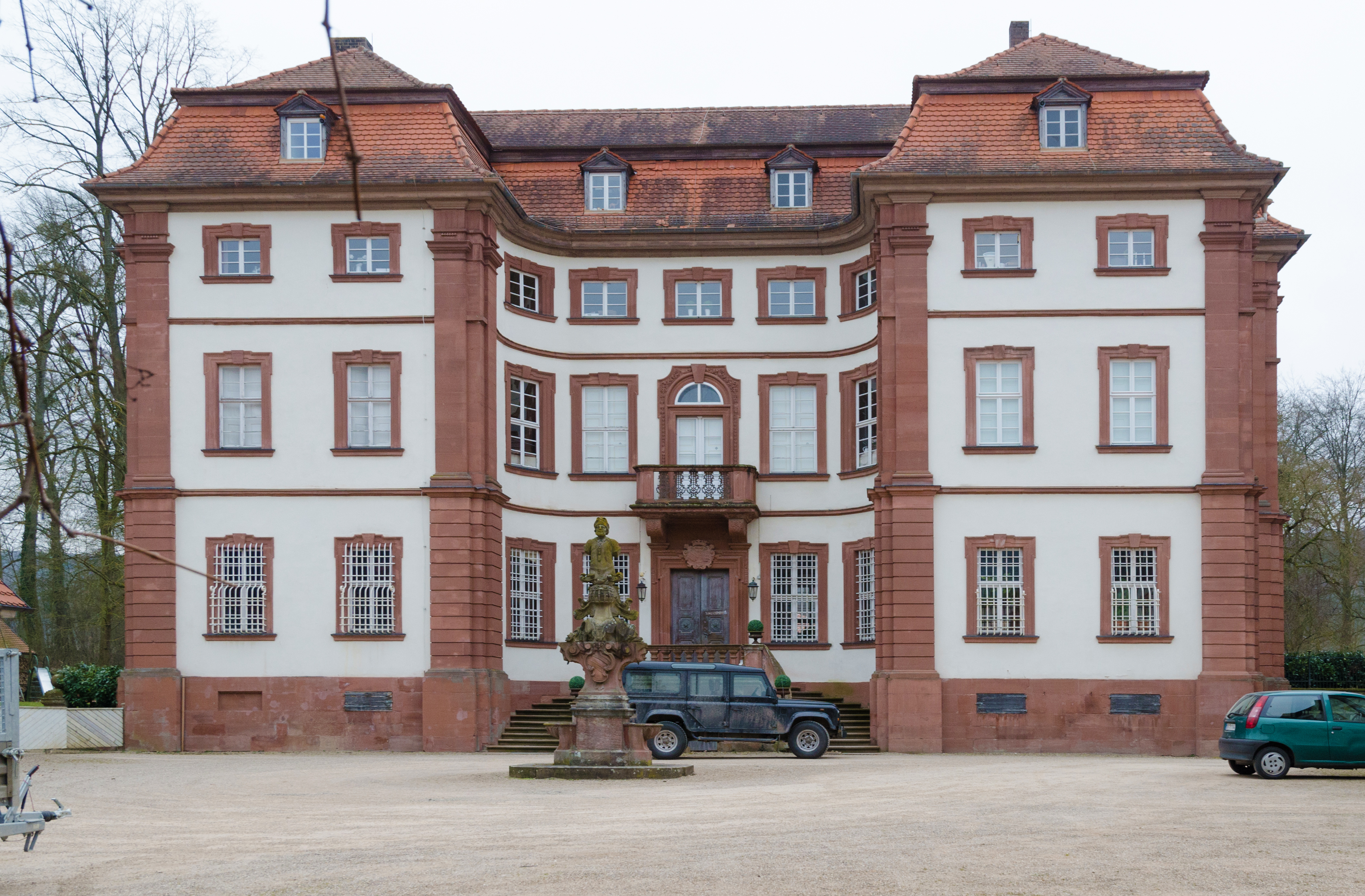 Lohr, Steinbach, Steinbacher Straße 1, Neues Schloss